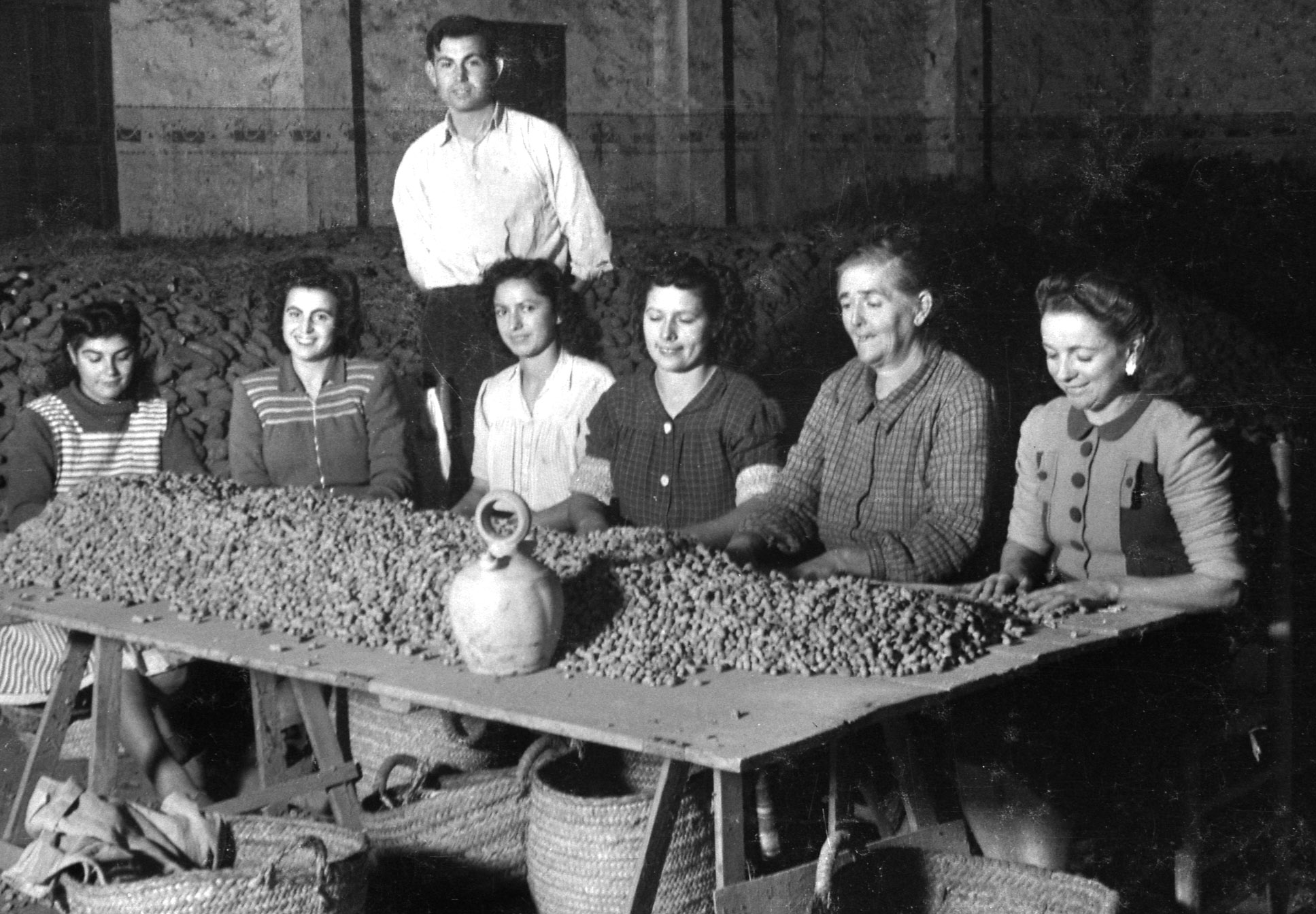 Imatge d'Ismael Latorre Mendoza, Alginet, 1947-11-19 Imatge editada en: Lozano, Josep i altres. Aljannat III. Monogràfic: Ismael Latorre Mendoza, any 2008. Edita: Ajuntament d'Alginet; ISSN 1886-984 X, pàgina 125. El Seis Doble, L'Ajuntament d'Alginet organitza l'exposició La força de la dona, 4-març-2016 Levante, La fuerza de la mujer que retrató Latorre, 6-03-2016